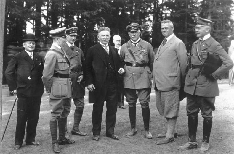 Die nationale Kundgebung am Hermannsdenkmal Am Sonntag, dem 1.9. fand auf der Grotenburg vor dem Standbild Hermann des Cheruskers eine vom Reichsausschuss für das deutsche Volksbegehren einberufene Kundgebung gegen die Kriegsschuldlüge und den Youngplan statt. Im Mittelpunkt der Veranstaltung, zu der etwa 10000 Personen erschienen waren, stand eine Rede Geheimrat [Alfred] Hugenbergs. UBz: in der Mitte Geheimrat Dr. Hugenberg, rechts daneben Major a.D. Freiherr v. Landsberg, westfälischer Landesführer, Oberst a.D. v. Xylander, Freiherr v.d. Lippe, von rechts der zweite Major a.D. Wagner, Stahlhelm-Bundesführer.